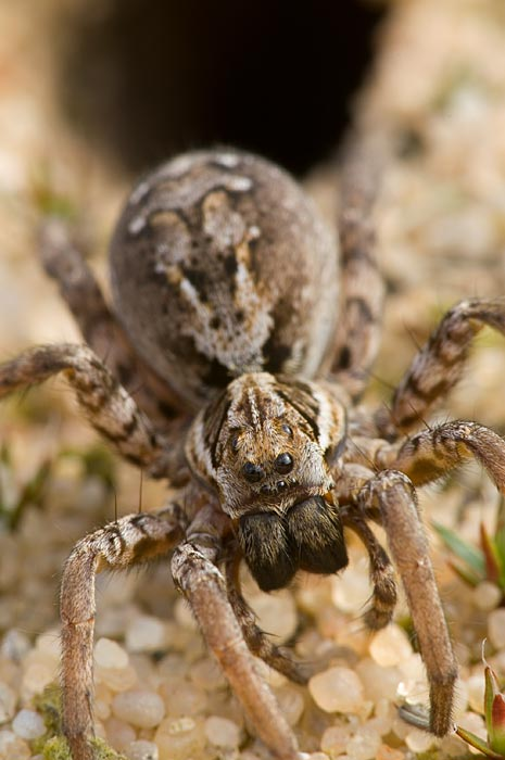 Alopecosa fabrilis, adult female